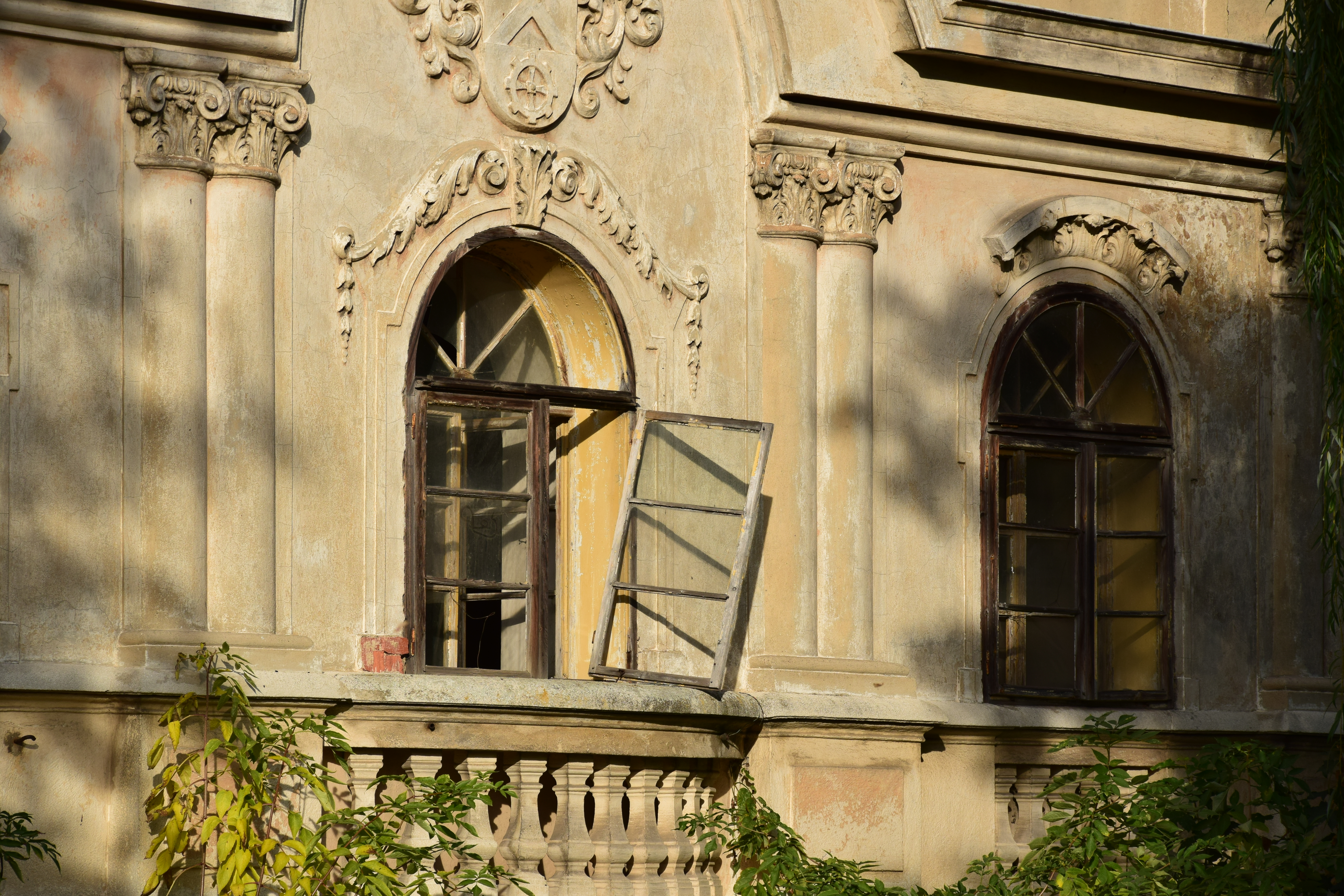 Zámek Poláky – detail okna ve středu jižního průčelí